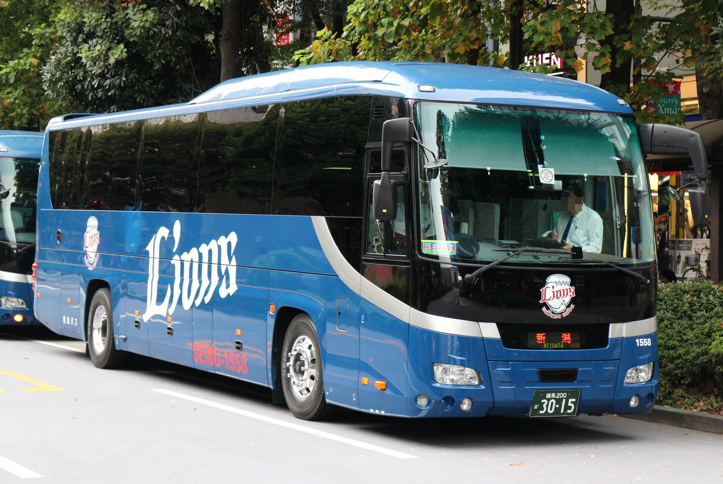 西武バス練馬営業所所属車両 東京 - 新潟線